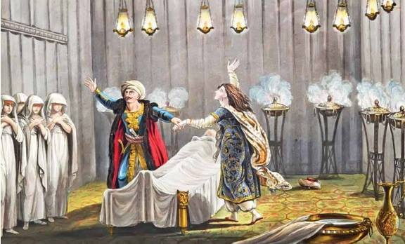 Ο Όρκος του Αλή Πασά και της Χαινίτσας επάνω στο νεκρό σώμα της Χάμκως